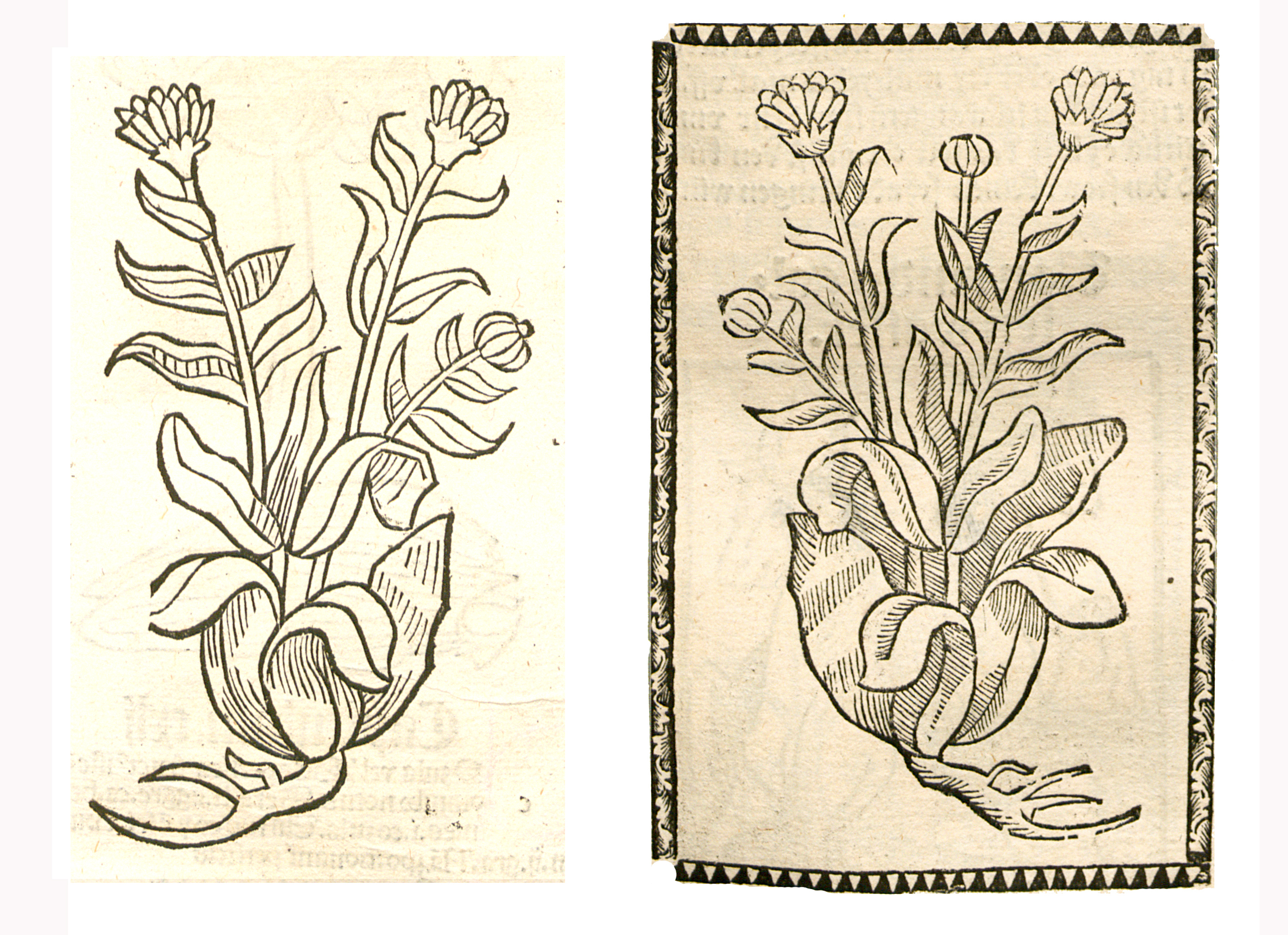 Abbildung von Ringel Blume (Calendula officinalis)